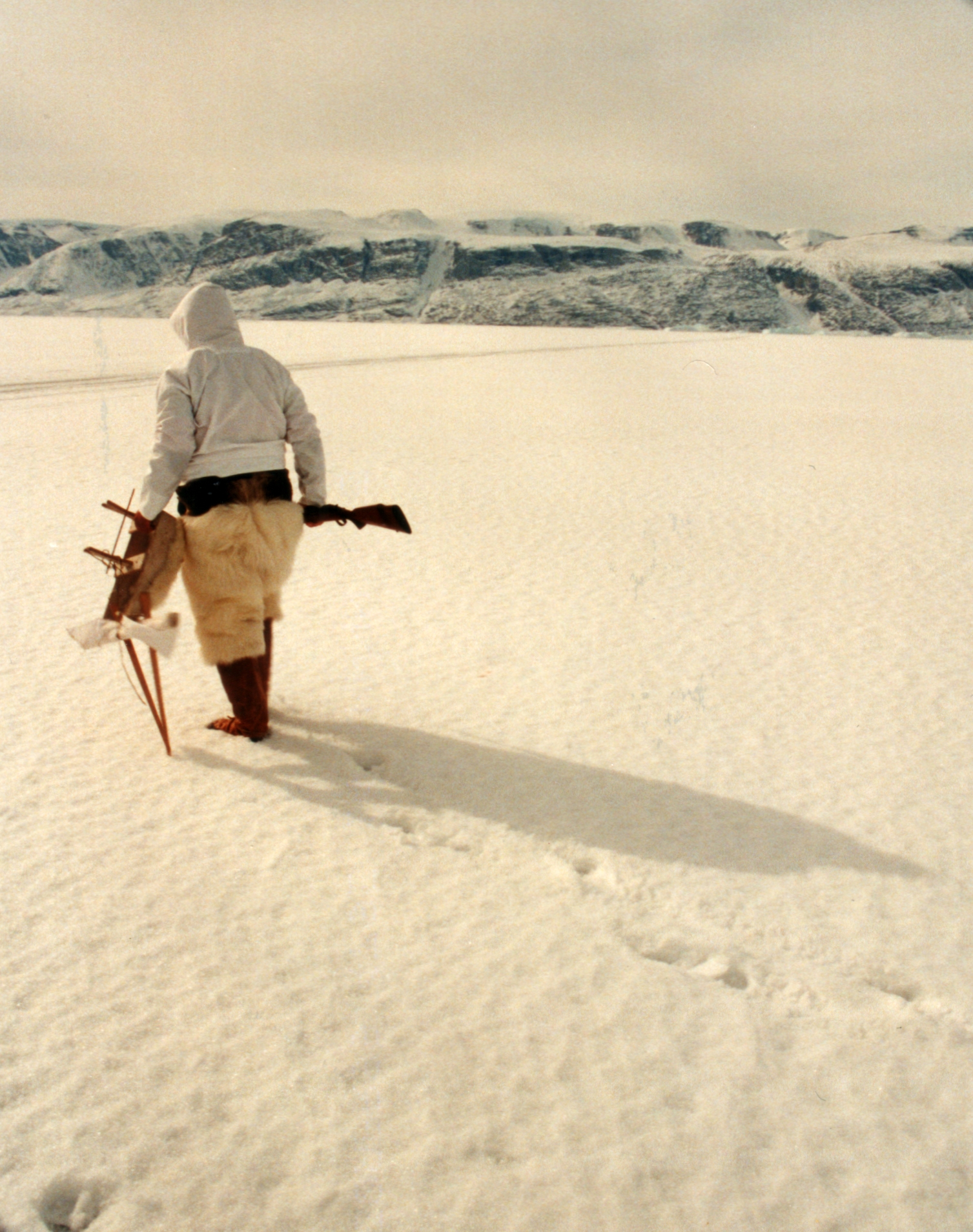 Groenlandse jager op het zeeijs, gekleed in traditionele jagersbroek uit ijberenvel